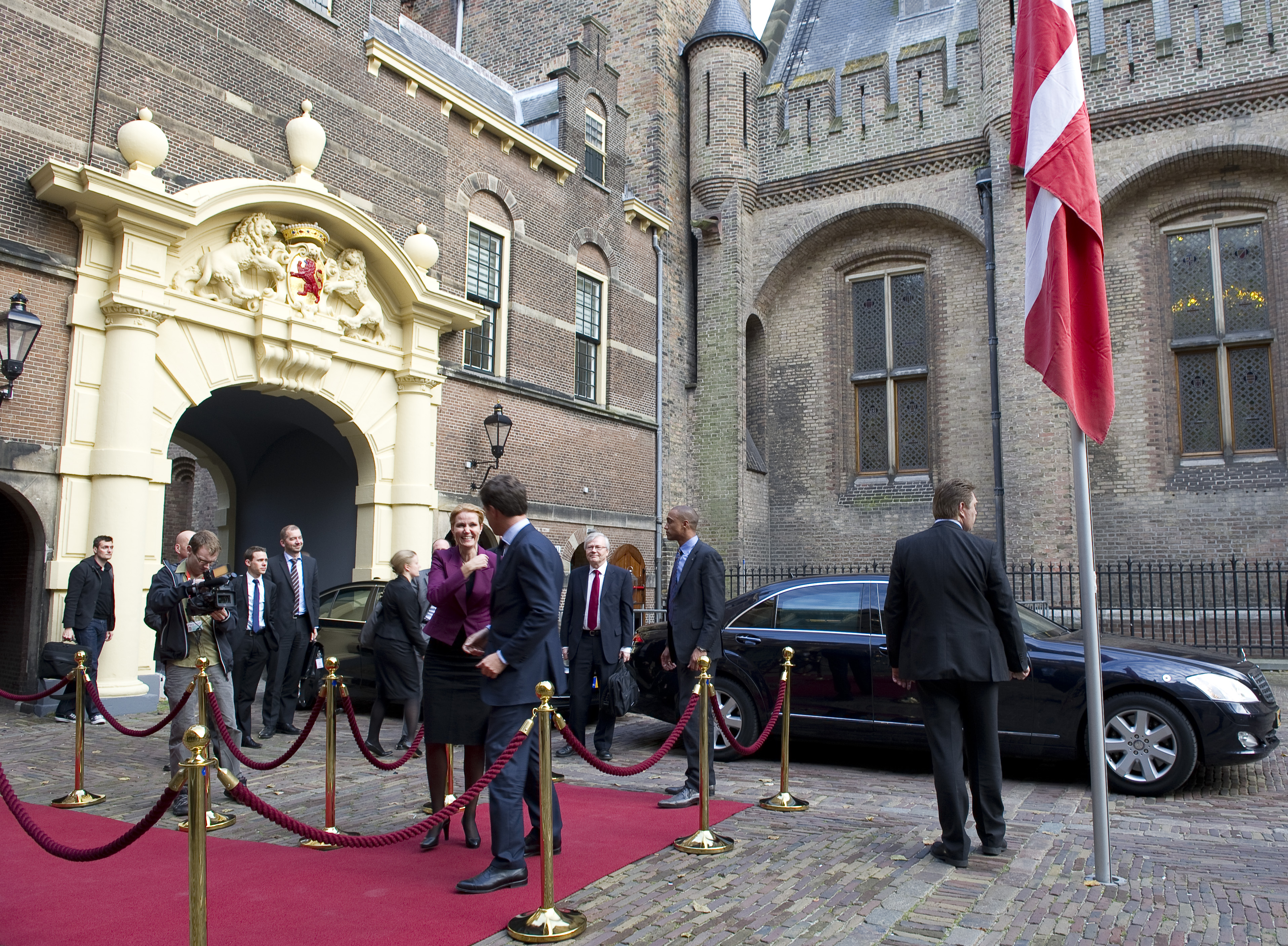 Minister-president Rutte ontvangt de minister-president van Denemarken, mevrouw Thorning-Schmidt. Tijdens de ontmoeting spraken zij onder meer over de schuldencrisis, de Europese agenda, waaronder de meerjarenbegroting, het aankomend Deens EU-voorzitterschap (januari – juni 2012), het veiligheids- en buitenlandbeleid en de bilaterale samenwerking.